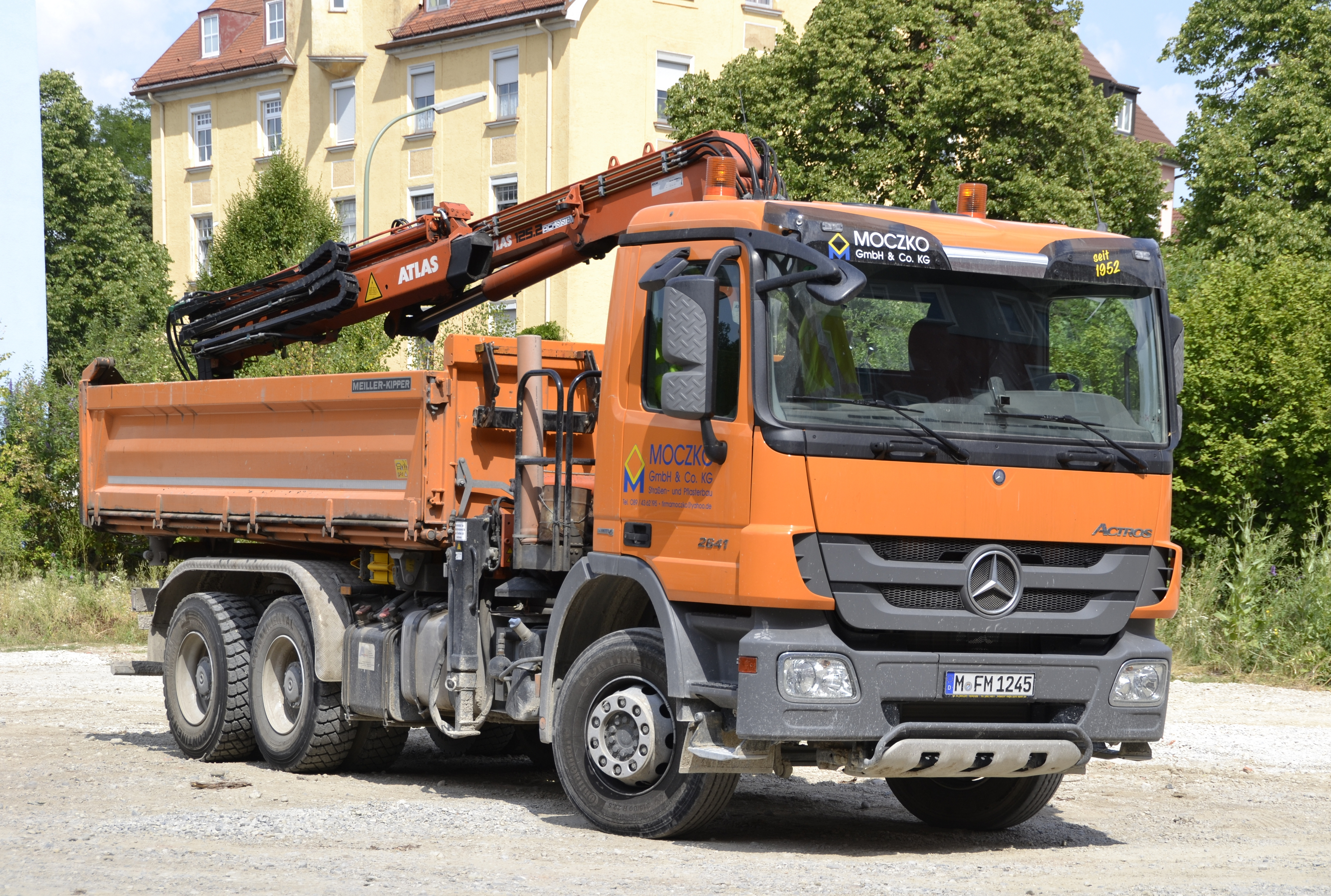 Mercedes-Benz Actros in München.